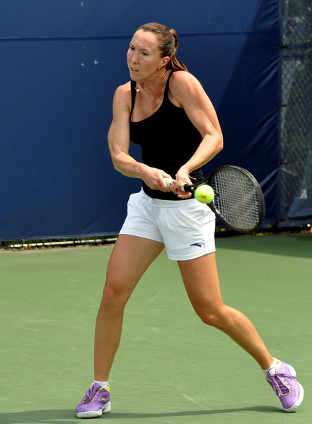 JelenaYankovic_0015